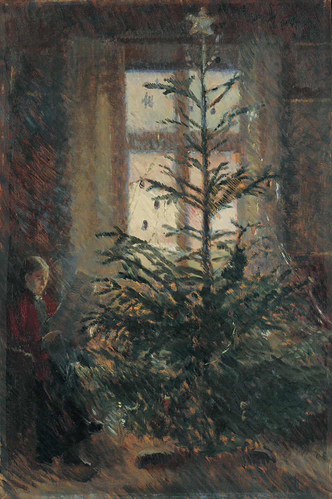 Anna Ancher sitting by the Christmas tree